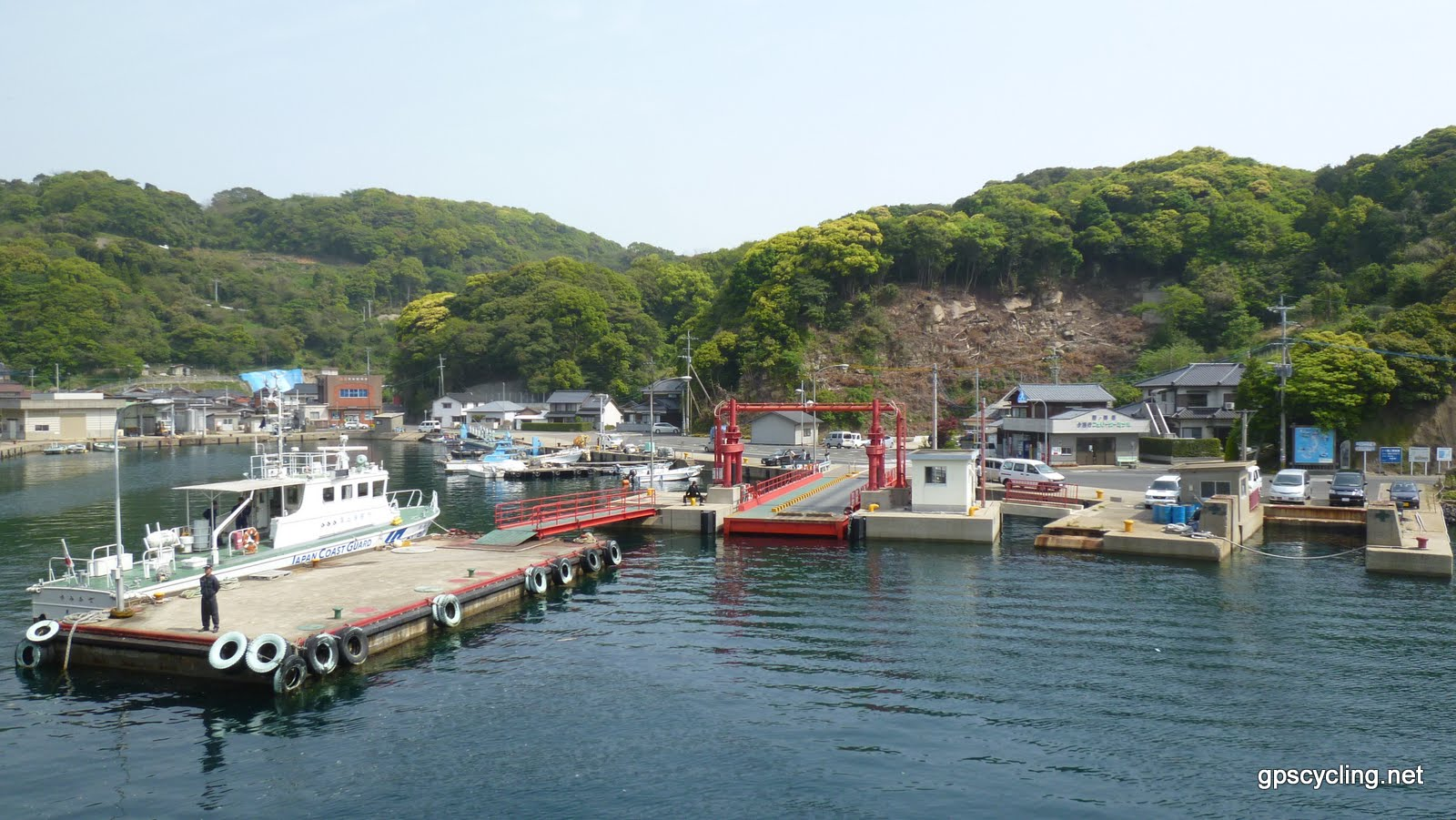 鷹島殿ノ浦港